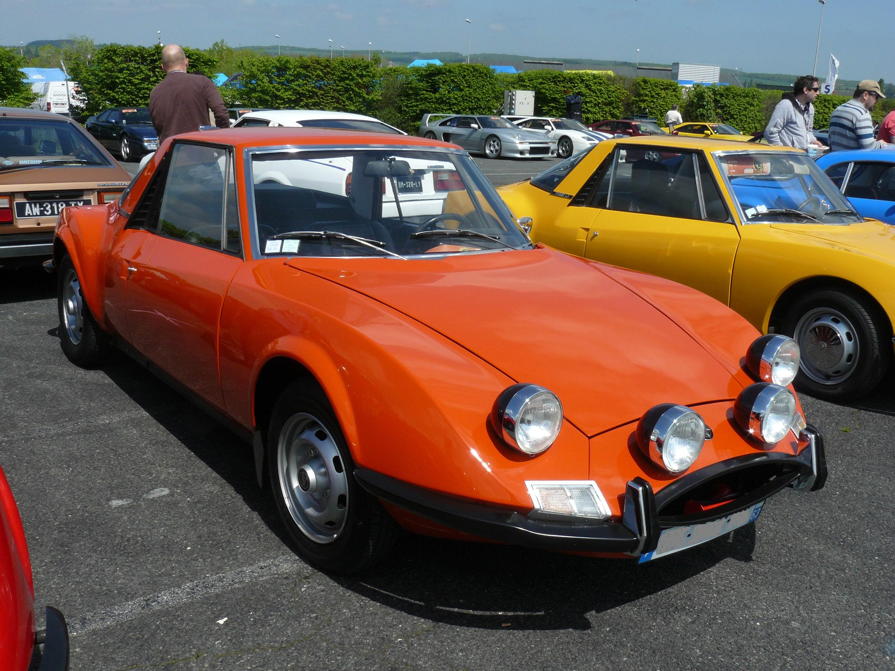 Classic Days 2013